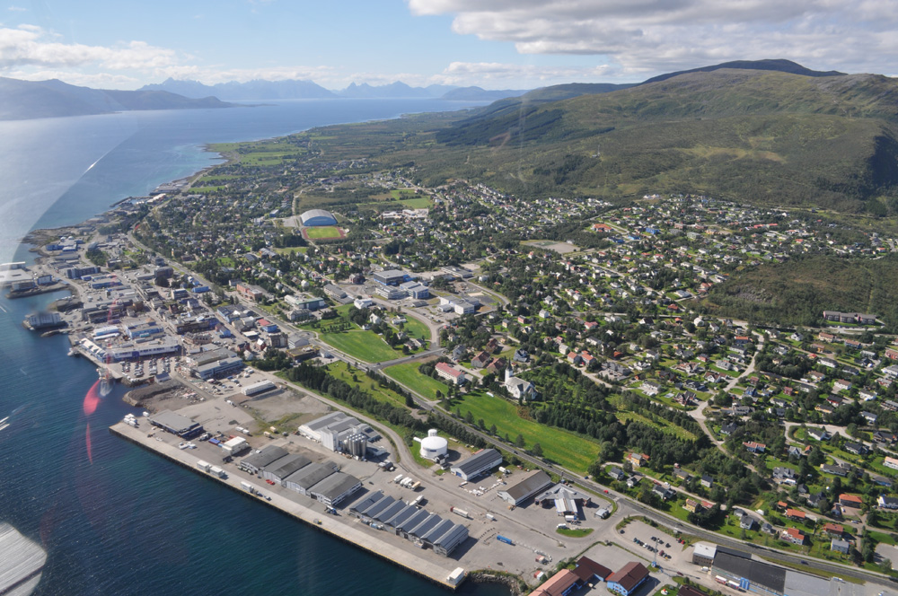 Sortland sentrum sett fra luften.